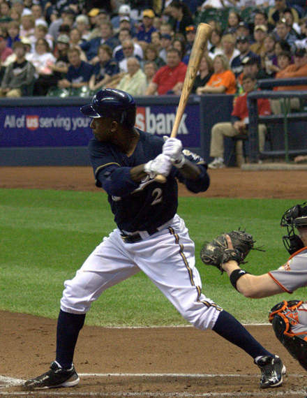 Nyjer Morgan